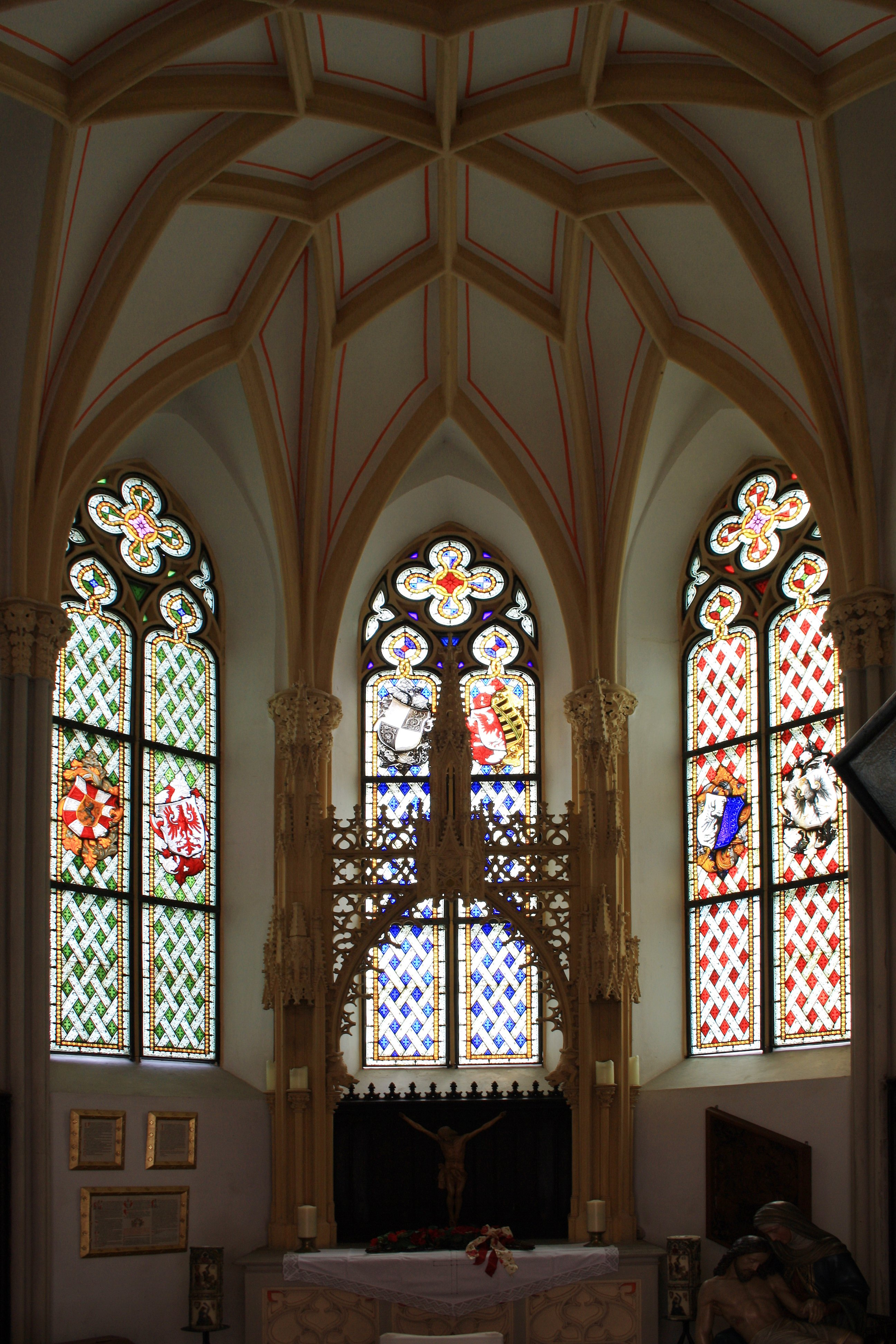 Burg Rheinstein (anro war der Nachbearbeiter).